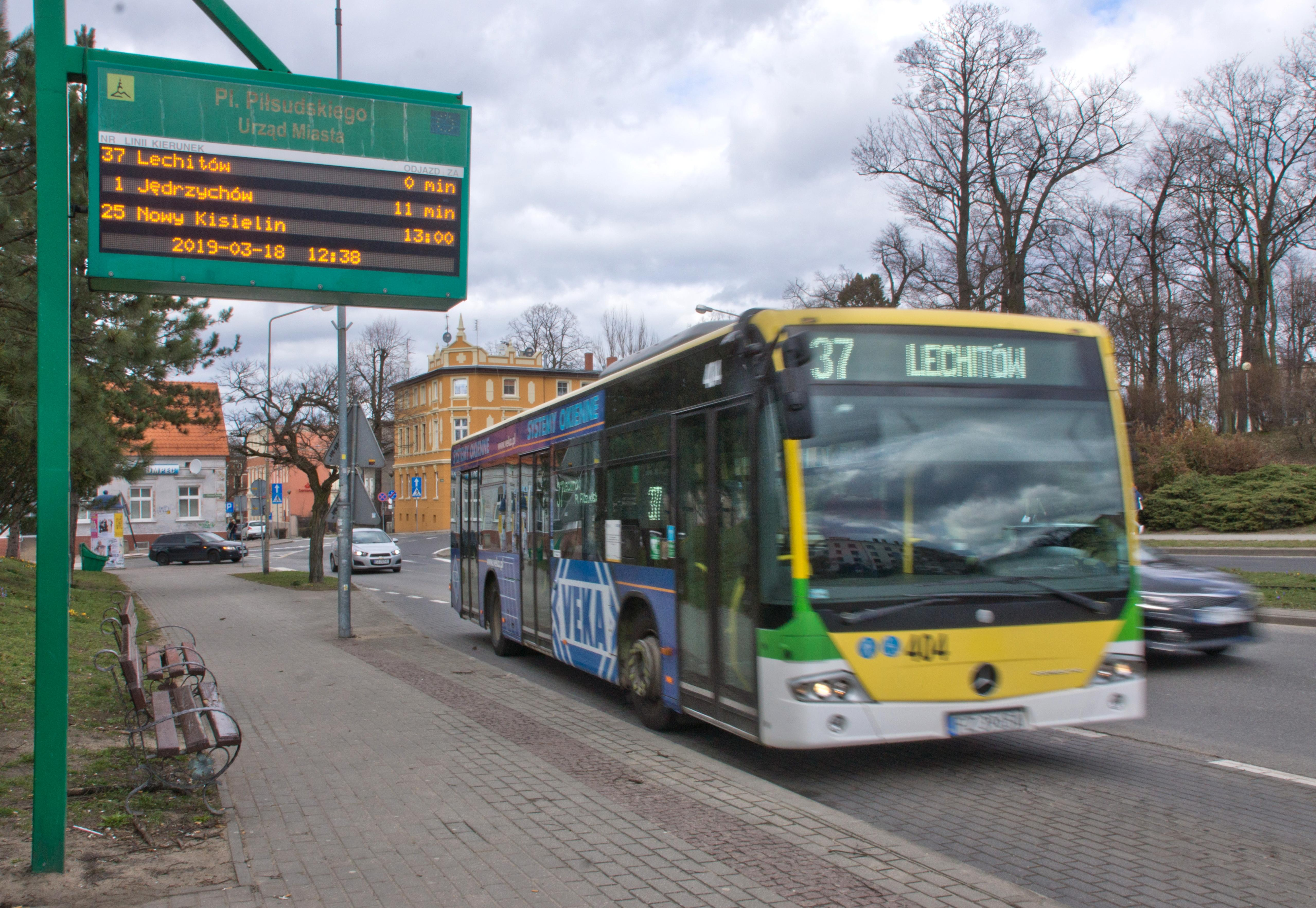 Zielona góra city bus